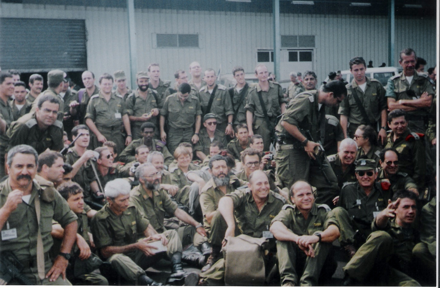 תמונה של שמואל כמפקד משלחת הסיוע הרפואי לנפגעי ברצח העם ומגפות כולירע ודיזנטריה בגבול זאיר-רואנדה עם חברי המשלחת